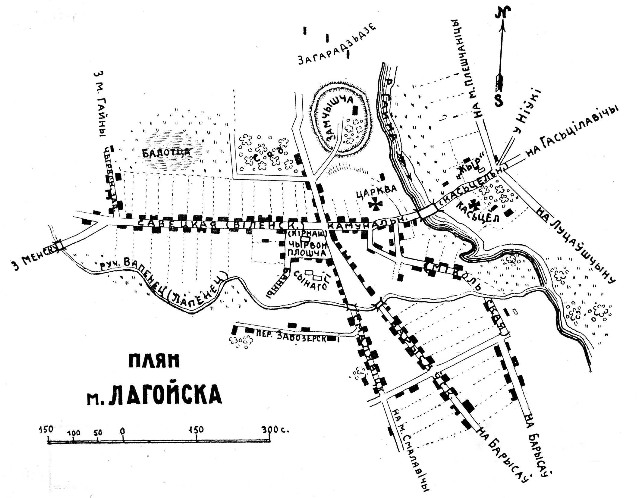 Беларуская (тарашкевіца): Лагойск (Łahojsk). Плян мястэчка